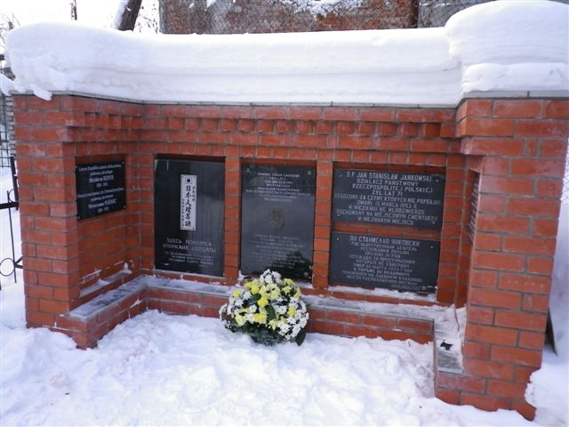 Eesti Moskva saatkonna esindajad külastasid Vladimiri linna kalmistut ning asetasid lilled seal asuva represseeritute mälestusmärgi juurde.